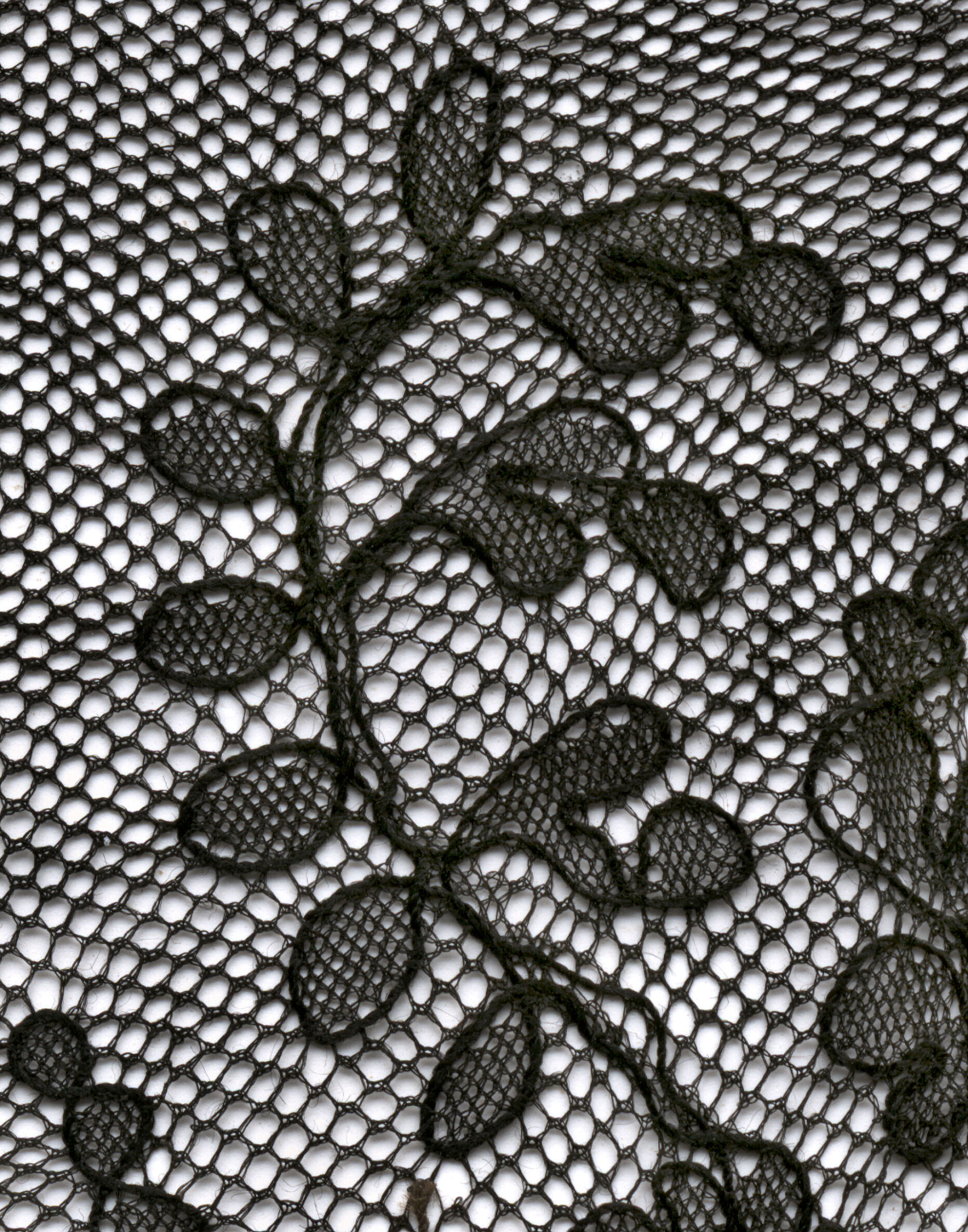 private collection